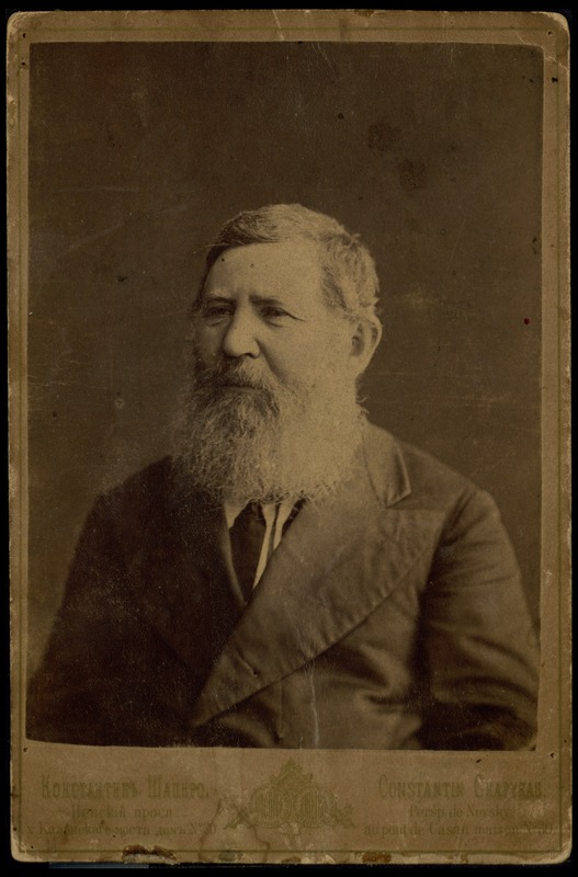 Der russisch-jüdische Schriftsteller und chassidische Gelehrte Elieser Zwi Zweifel (1815-1888)